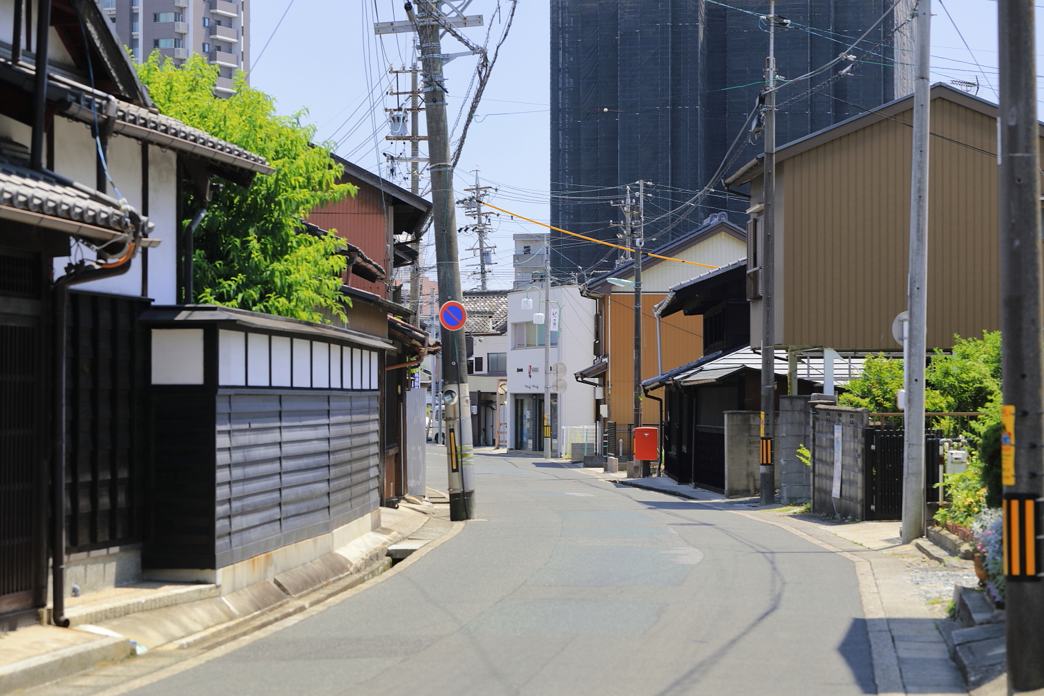 旧東海道景観（愛知県道222号緑瑞穂線）（名古屋市緑区鳴海町字三皿、2020年（令和2年）6月） Canon EOS 5D Mark IV